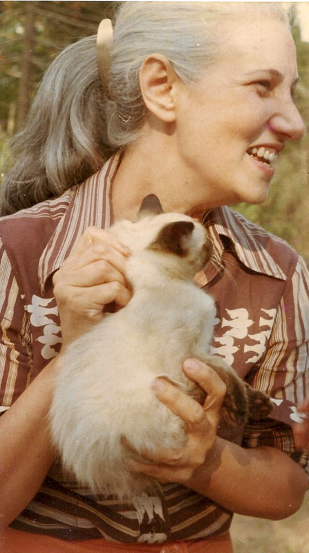 maria jose giglio, casa do escritor, cde, gatos, poeta, poesia, jornal, cds, bazar, literatura, mjg